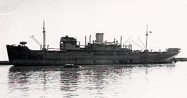 Der italienische Blockadebrecher CORTELLAZZO